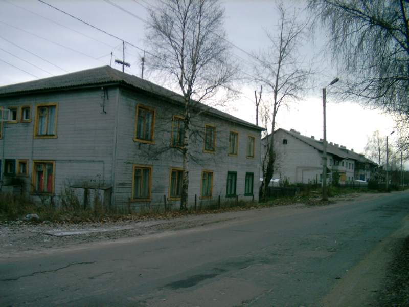 Улица в пос. Мелиоративный Прионежского района Республики Карелия